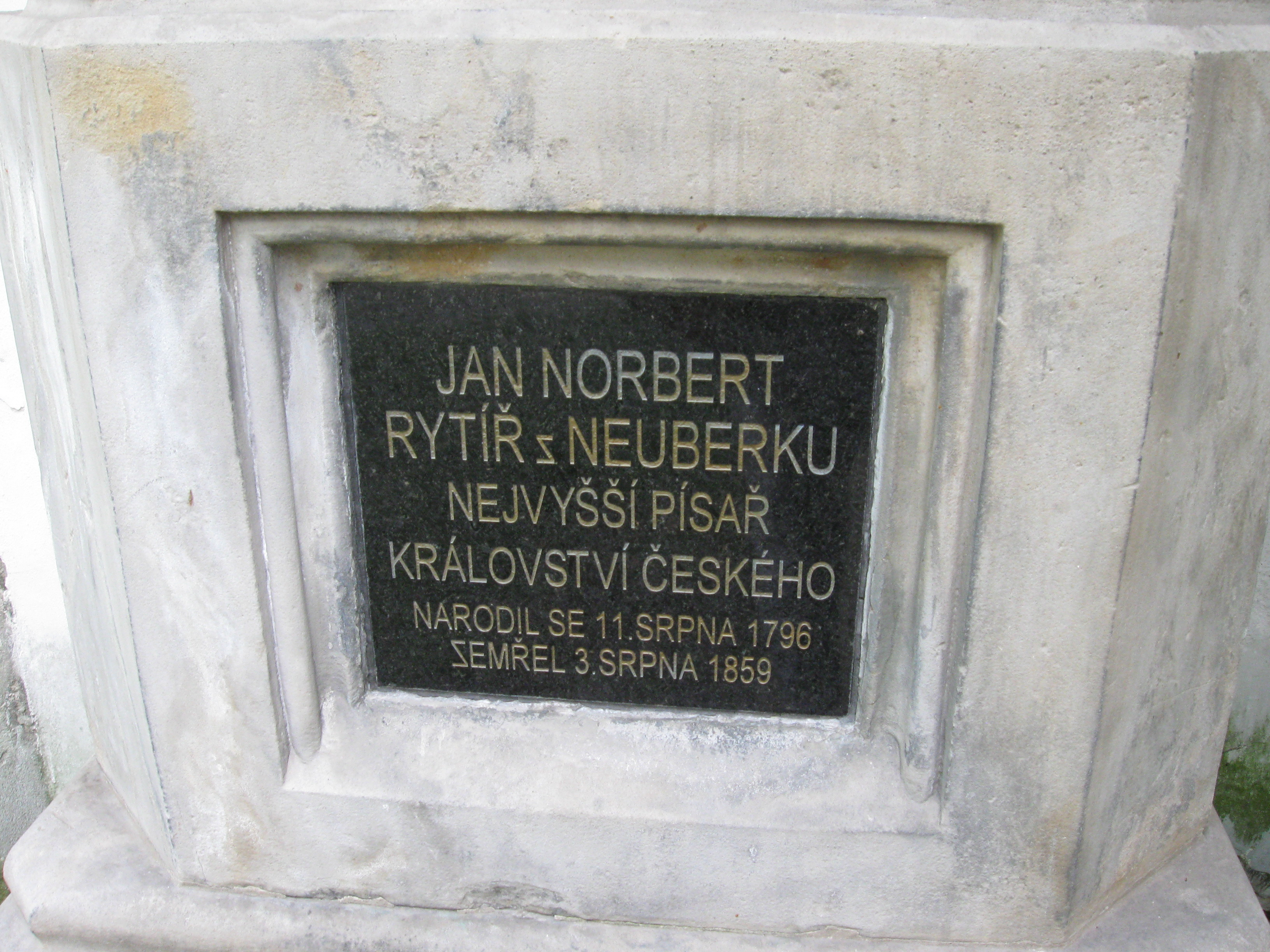 Kostel sv. Havla (Mladá Boleslav), u nám. Míru, Mladá Boleslav